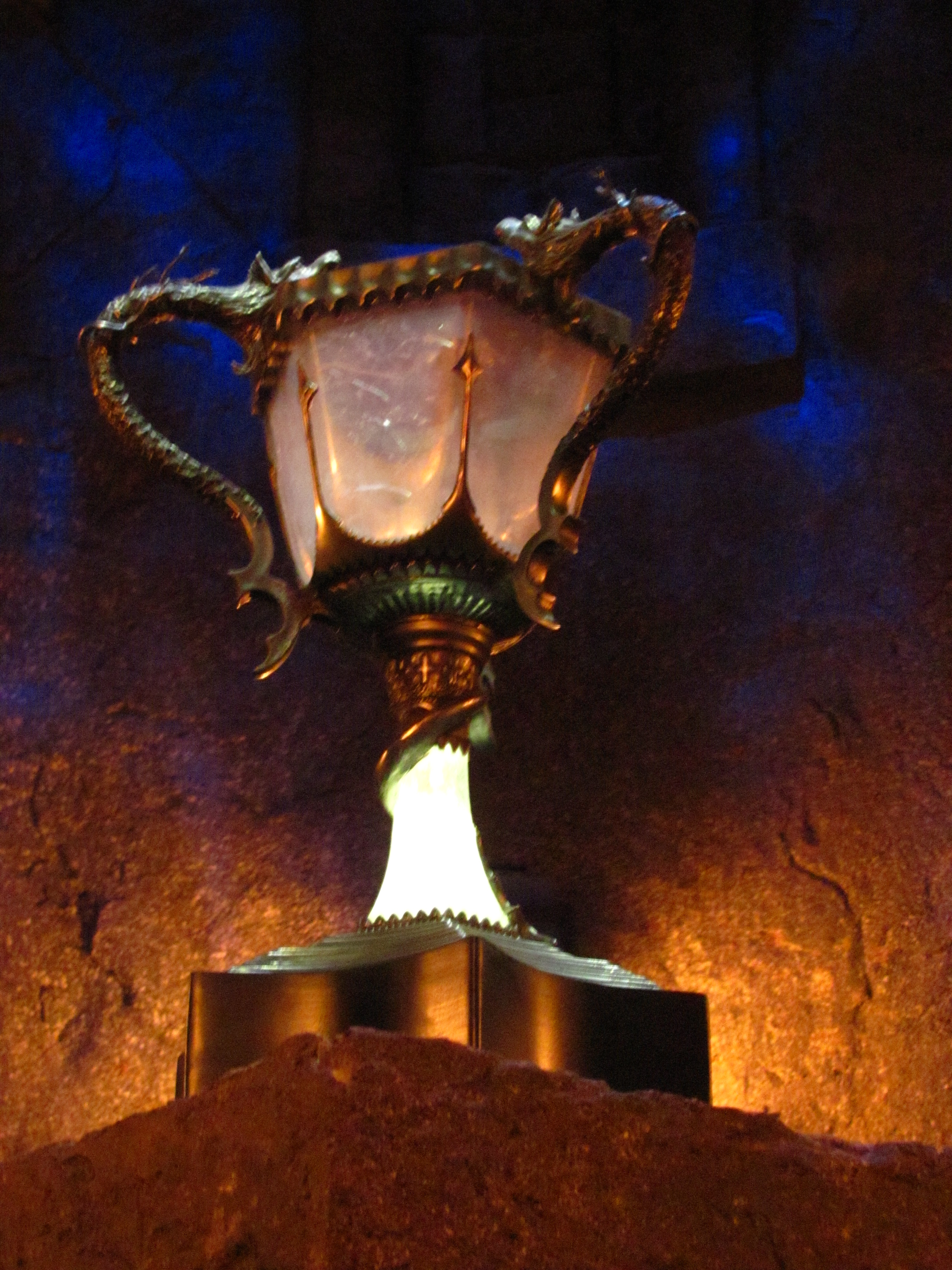 Dragon Challenge queue